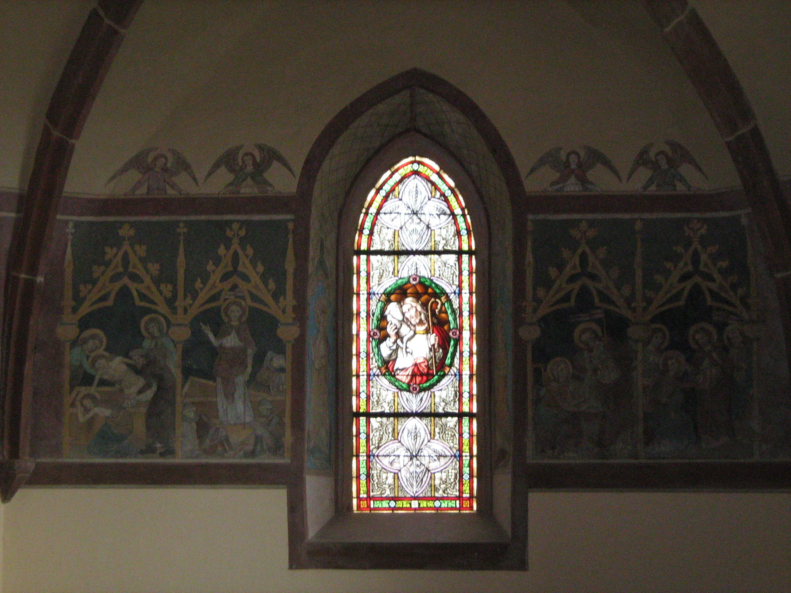 fresque du choeur de l'eglise d'Eckendorf à Alteckendorf